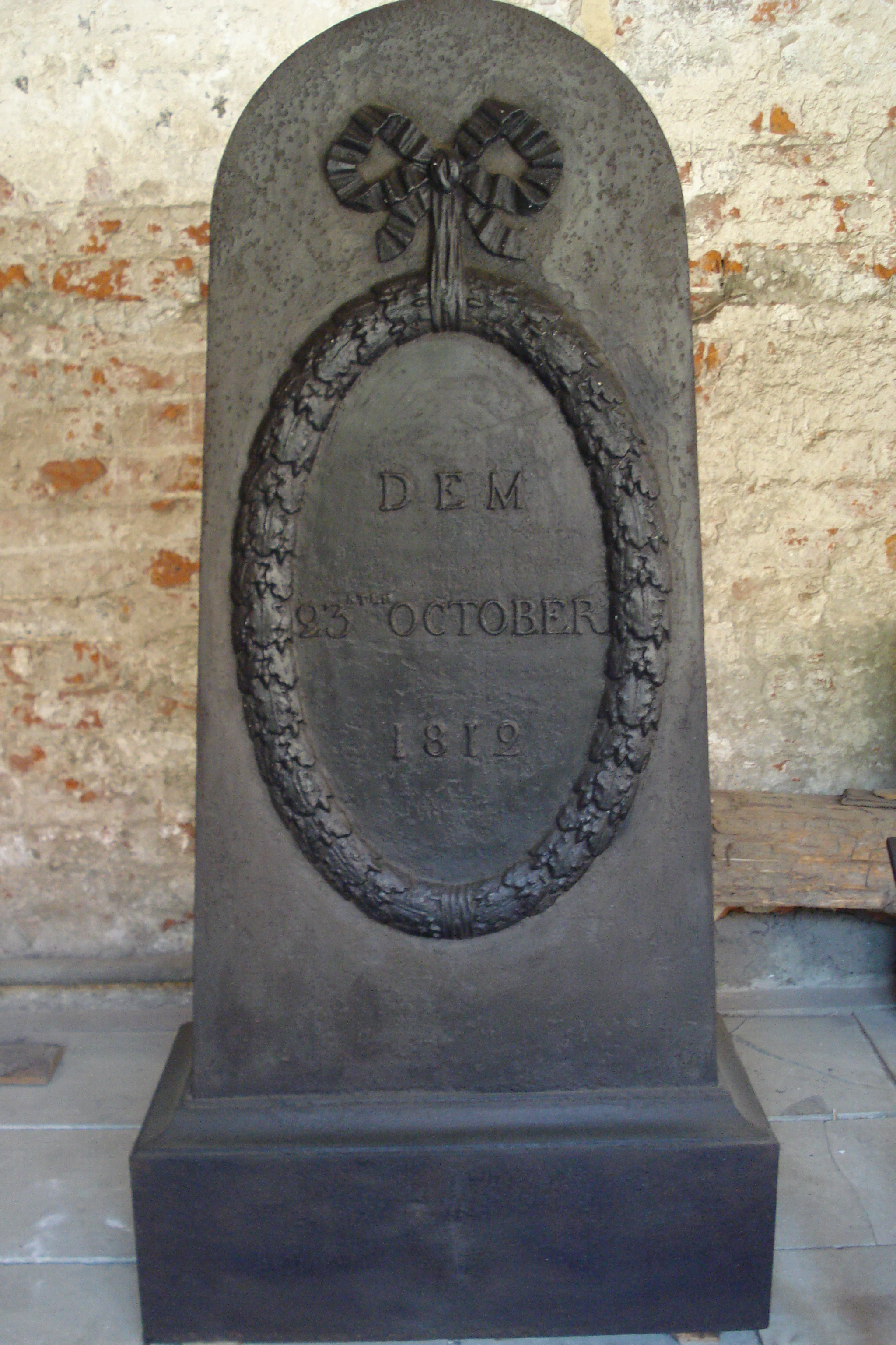 The monument in memory of Filippo Paulucci (1779-1849), a Governor of Livonia, erected in 1851 (with the date of arrival in Riga). Памятник Филиппу Осиповичу Паулуччи, лифляндскому и курляндскому генерал-губернатору, установленный в Верманском парке в 1851 году (с датой прибытия в Ригу 23 октября 1812 года). Хранится в галерее Домского собора